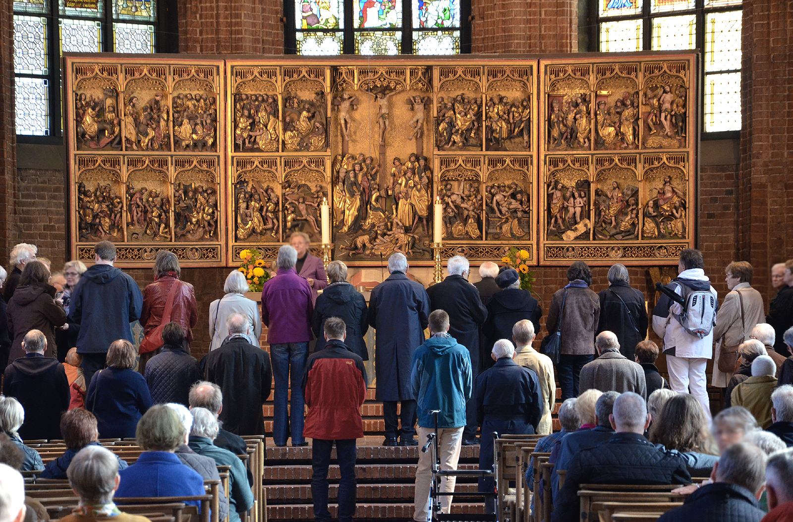 Gläubige in der Marktkirche von Hannover während eines Gottesdienstes mit Pastor Wolfgang Puschmann, hier vor dem Altar zum Heiligen Abendmahl ...